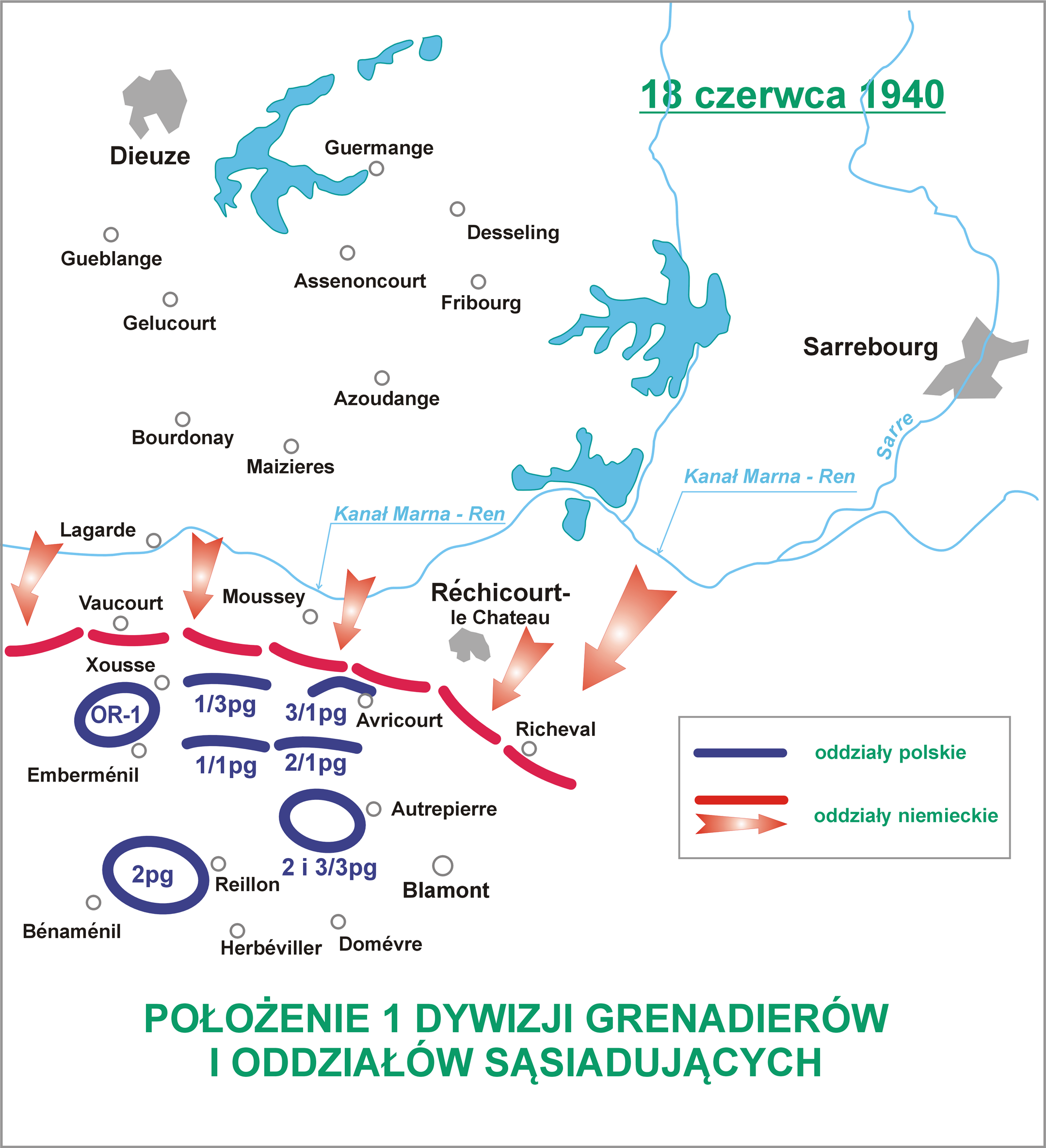 Położenie 1 Dywizji Grenadierów w dniu 18 czerwca 1940 r